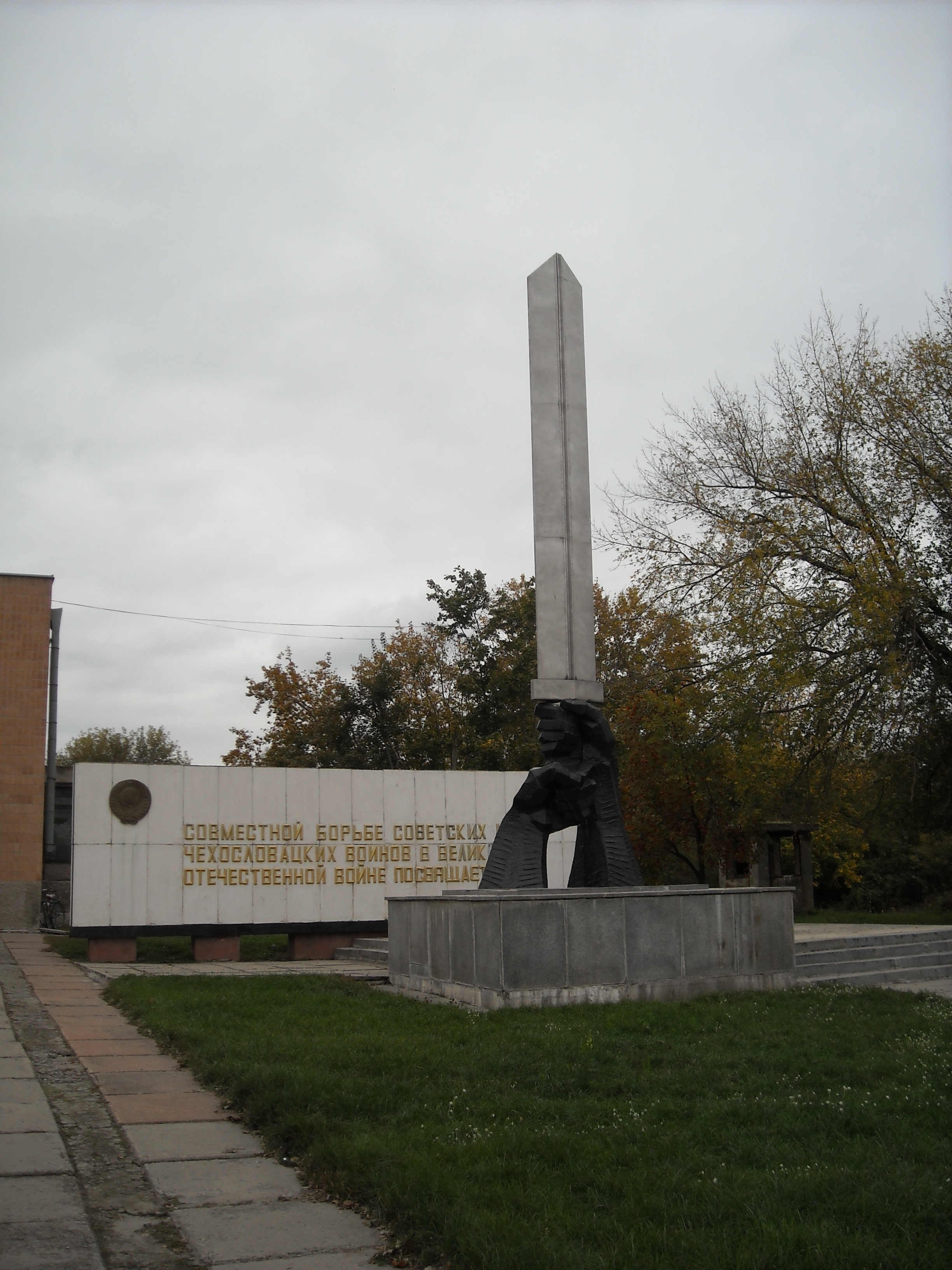 Україна. Зміївський район. Соколово. Музей. 2010 рік.